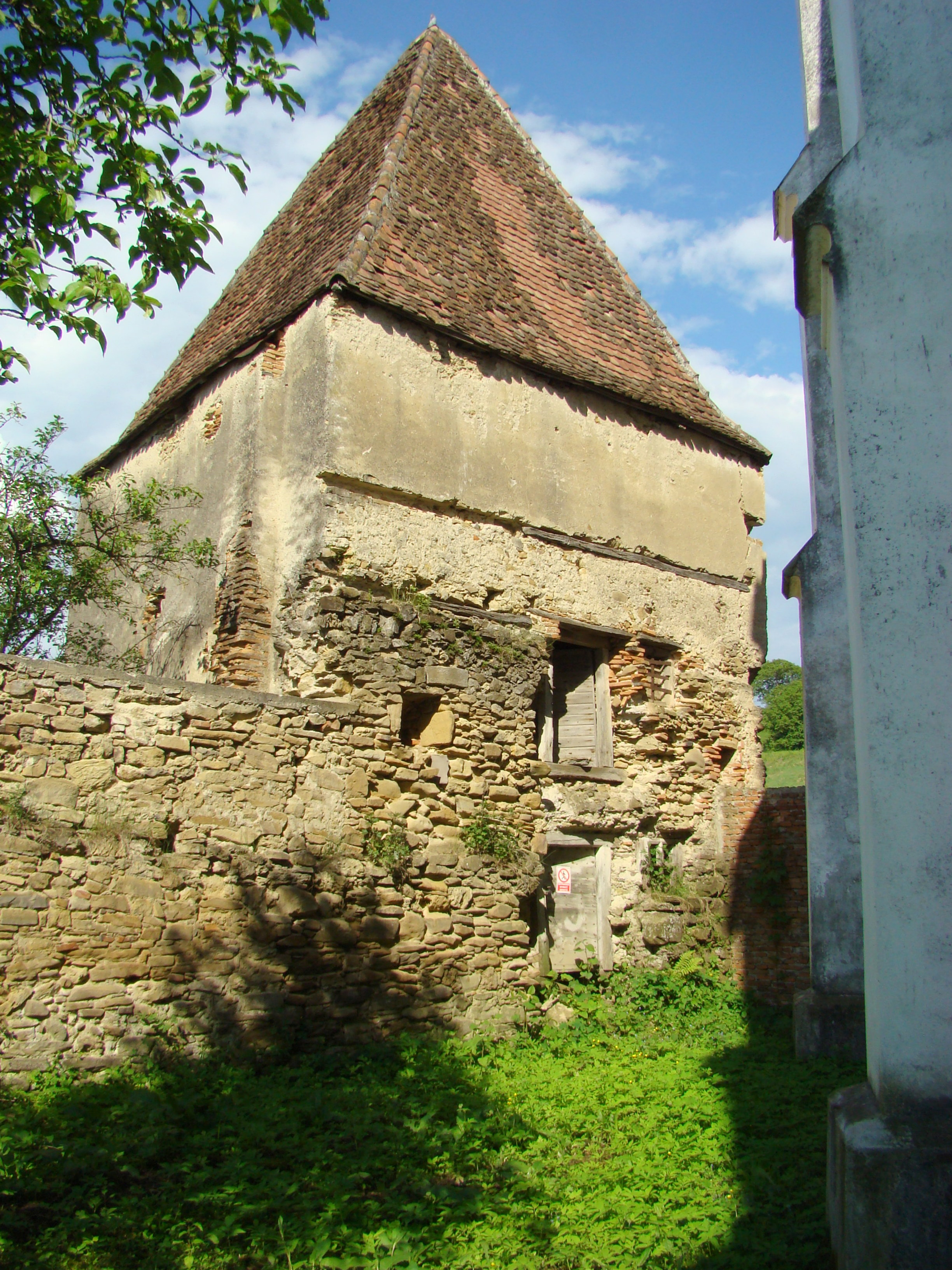 Incinta fortificată, cu turnurile, sat Senereuș; comuna Bălăușeri 02